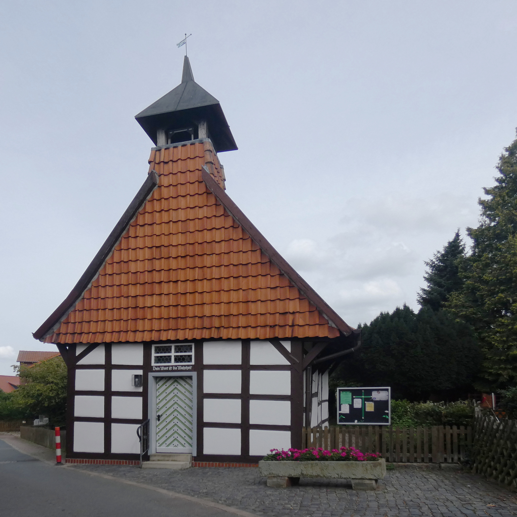 Die "Kapelle Northen" ist eine denkmalgeschützte Fachwerkkapelle in Northen, einem Stadtteil von Gehrden in der Region Hannover in Niedersachsen.